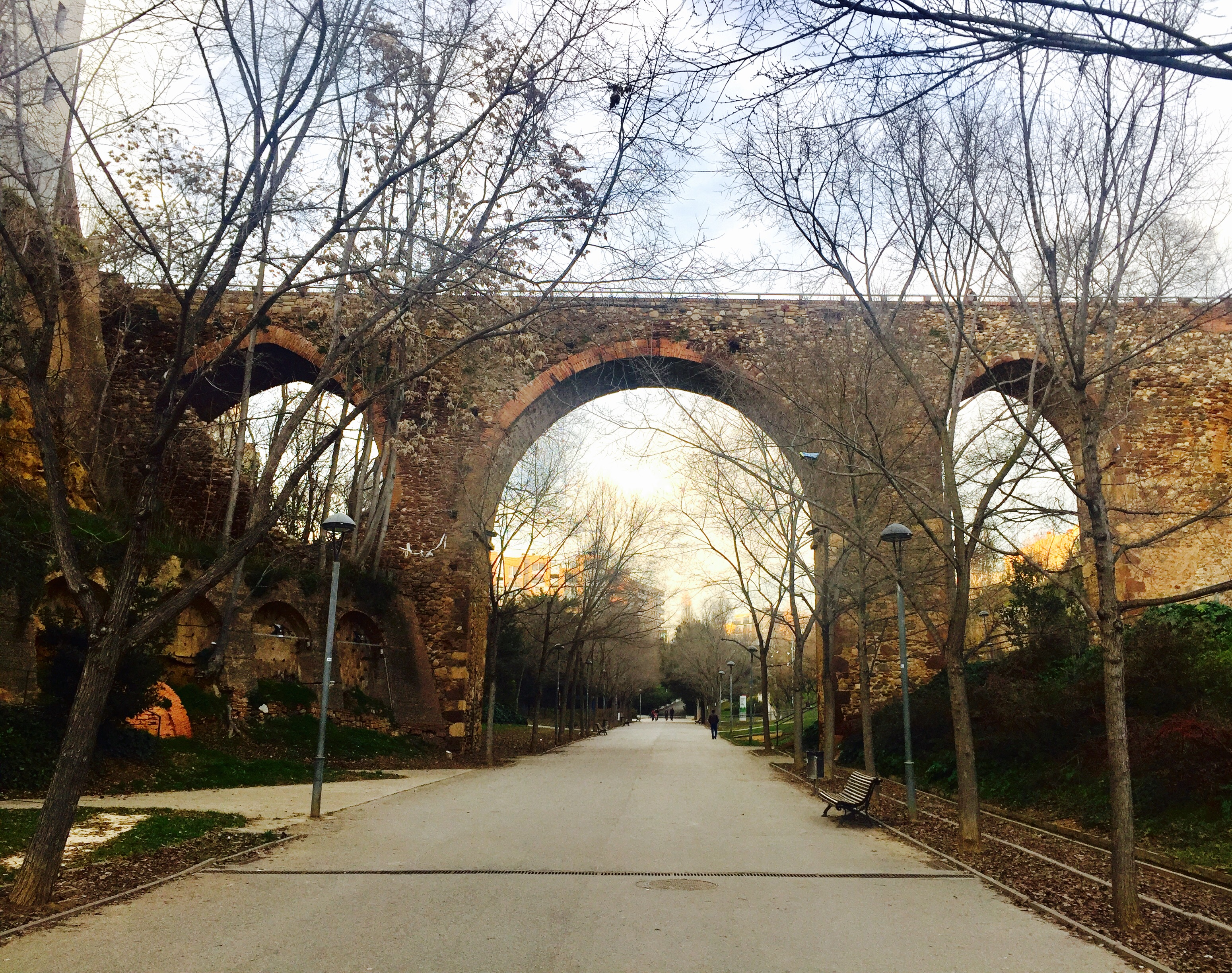 Parque de Vallparadís. Puente románico de San Pedro